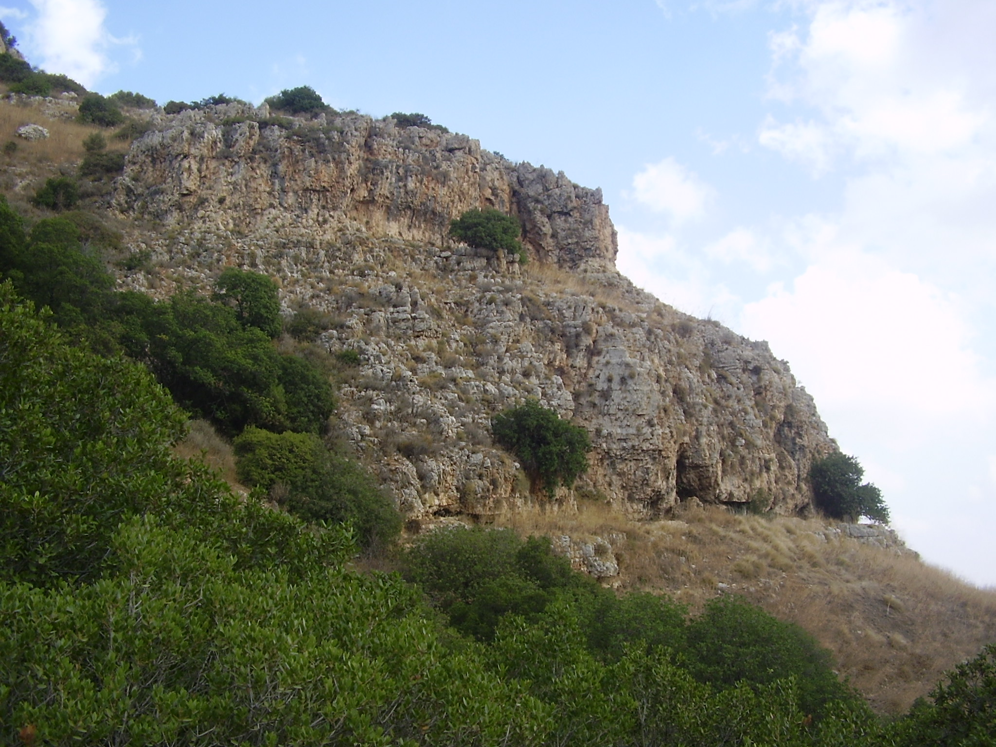 נחל נחש בהר הכרמל מצוק הכתר מעל הנחל Mount Carmel